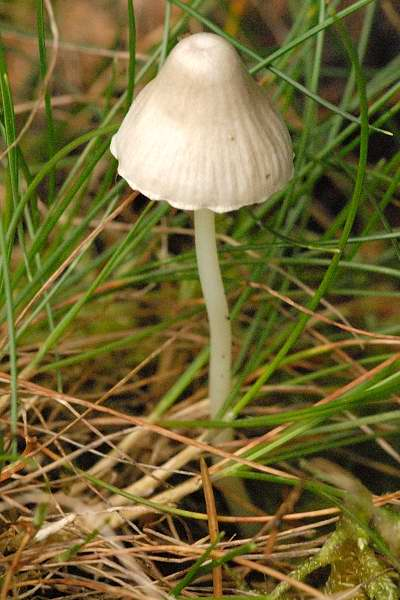 Mycena metata from Commanster, Belgian High Ardennes .